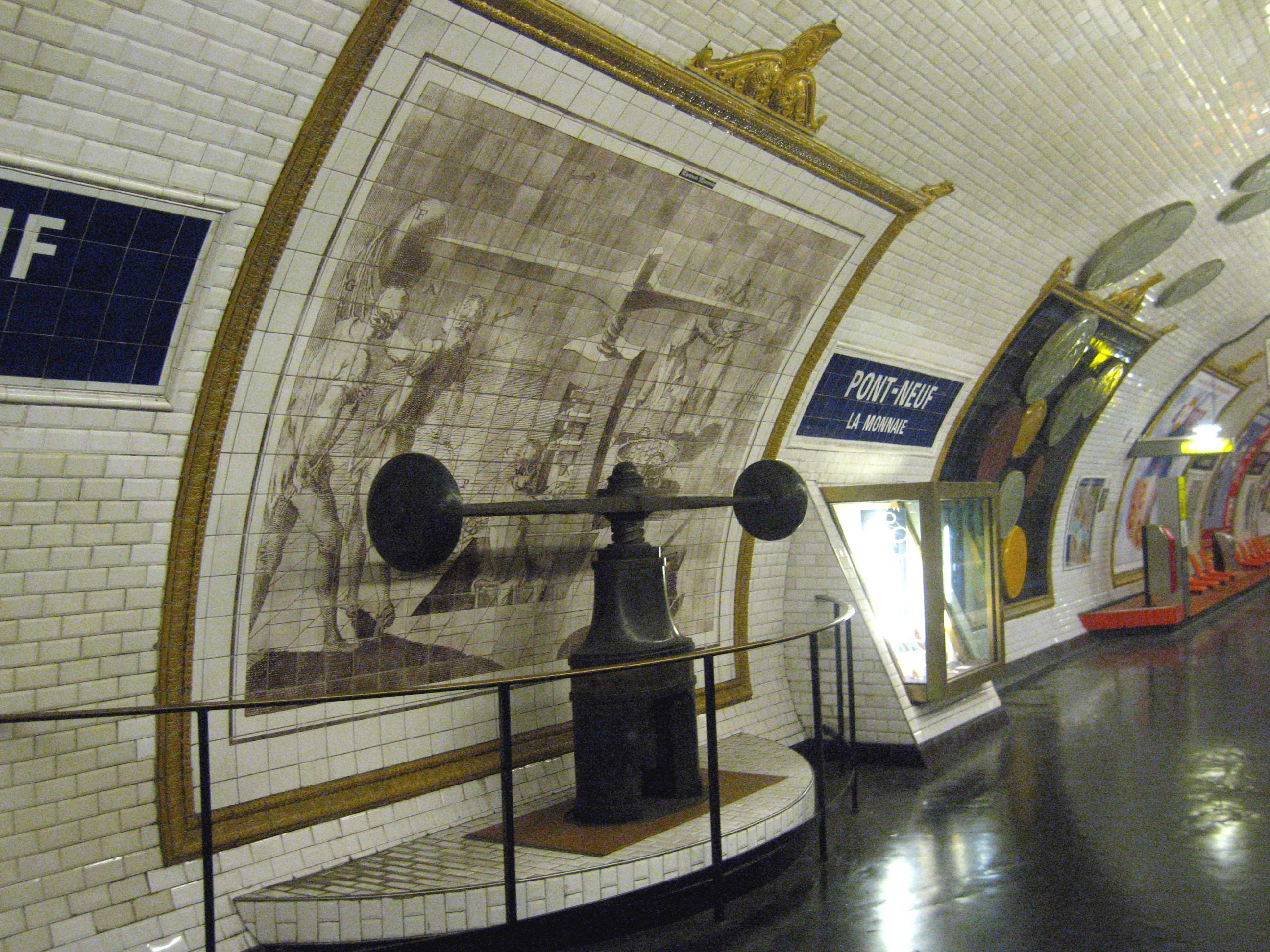 Metro de Paris ligne 7 station Pont Neuf Lieu : Paris, France Date : Juin 2006 Auteur : Pline photo personnelle